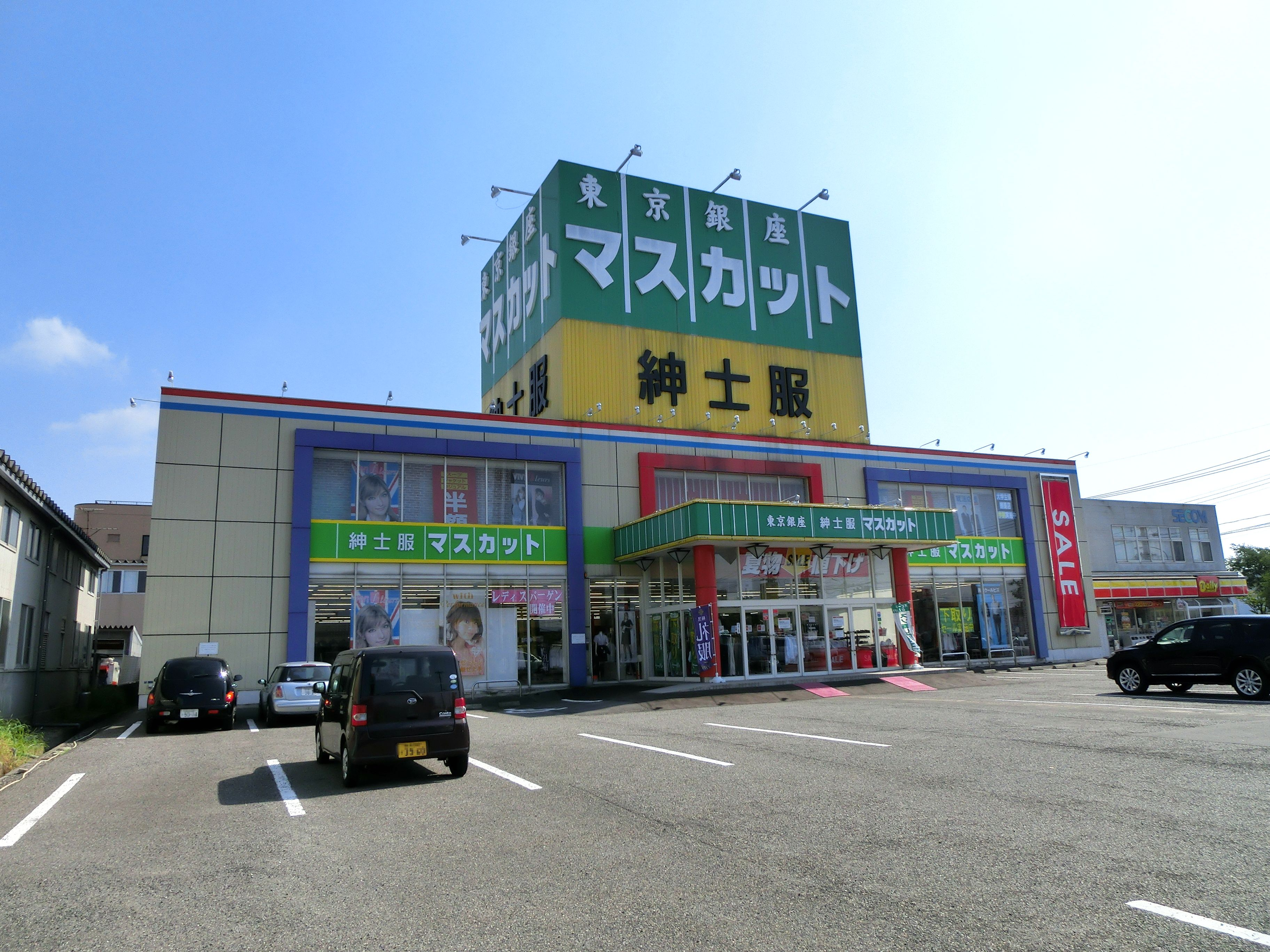 紳士服マスカット新潟亀田店（現・はるやま新潟亀田店）